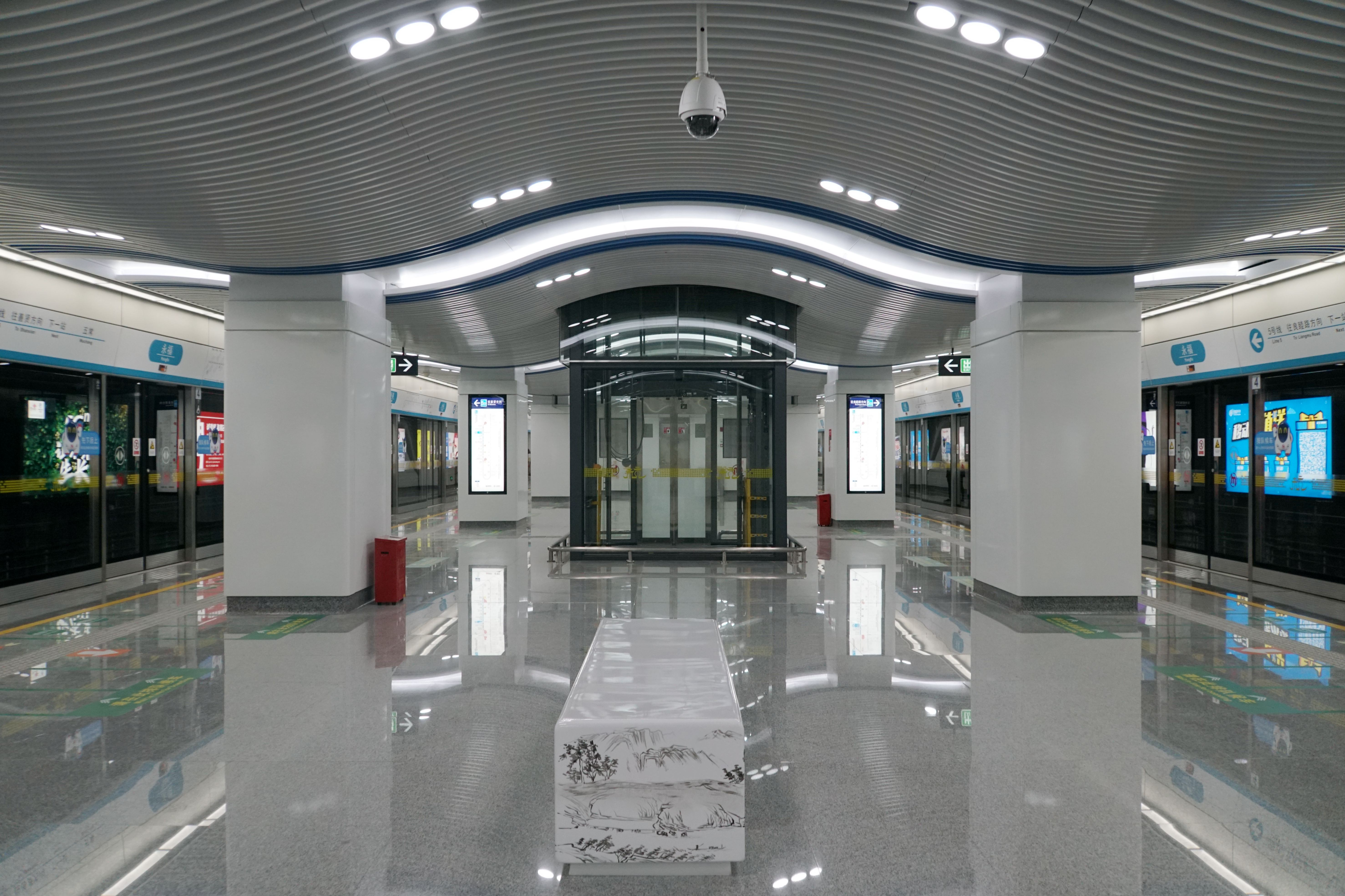 永福站站台